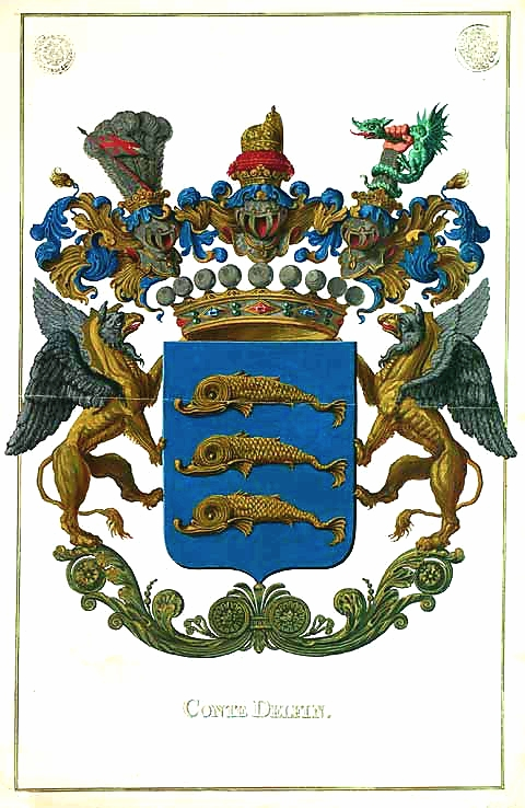 Wappen der Grafen Delfin, auch Dolfin, altes Patriziergeschlecht von Venedig: gräflich gekröntes Wappen mit drei Delfinen und drei Helmen, gehalten von zwei Greifen.